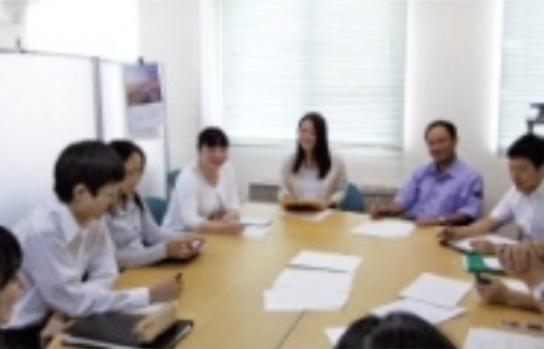 判定会議の様子